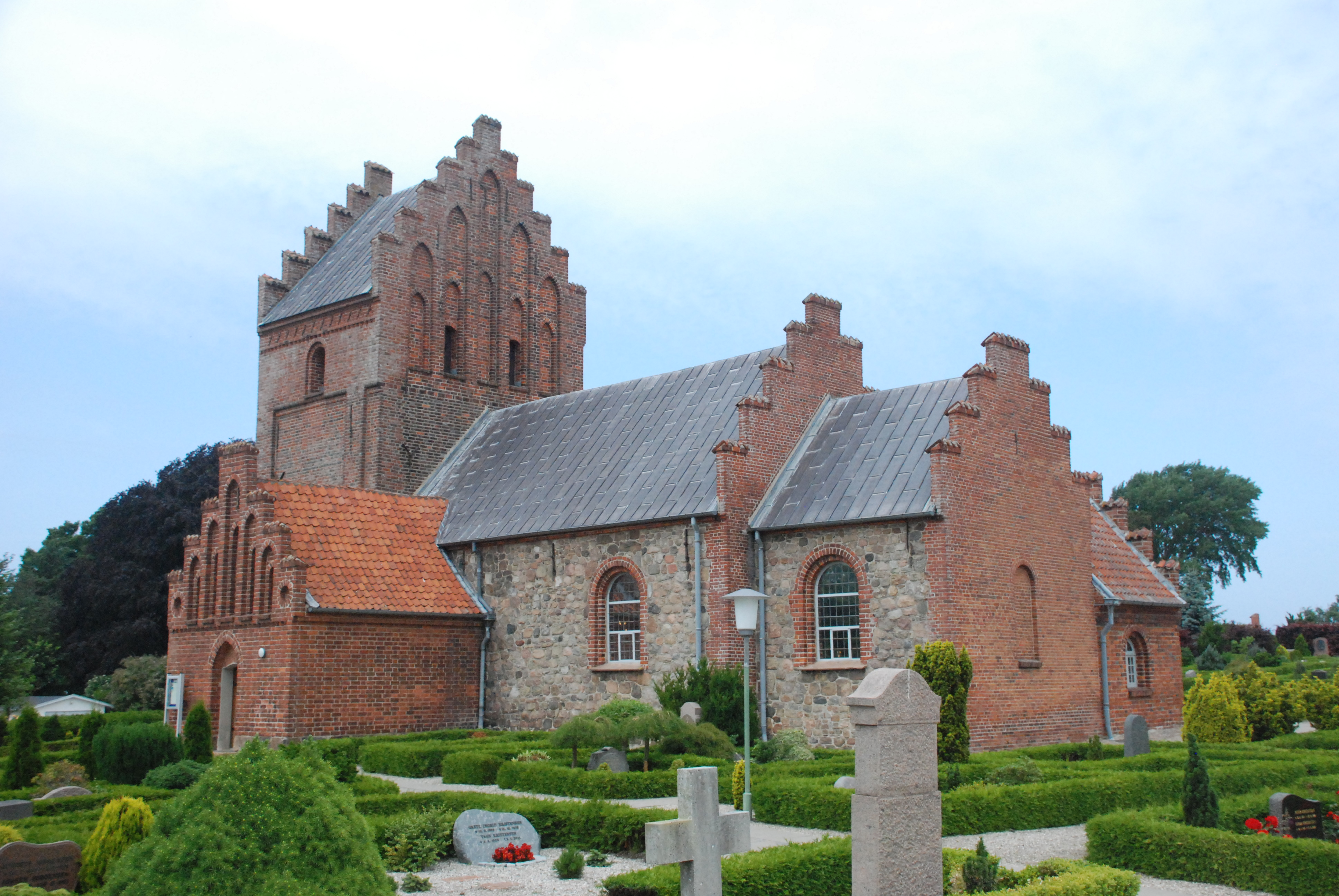 Blistrup Kirke, Blistrup Sogn, Holbo Herred, Frederiksborg Amt, Danmark.